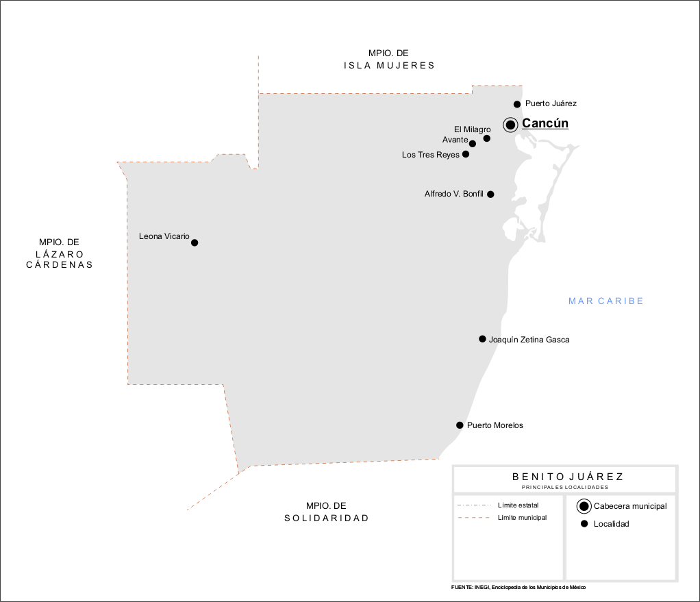 Mapa de las principales localidades del Municipio de Benito Juárez en el estado de Quintana Roo, México.